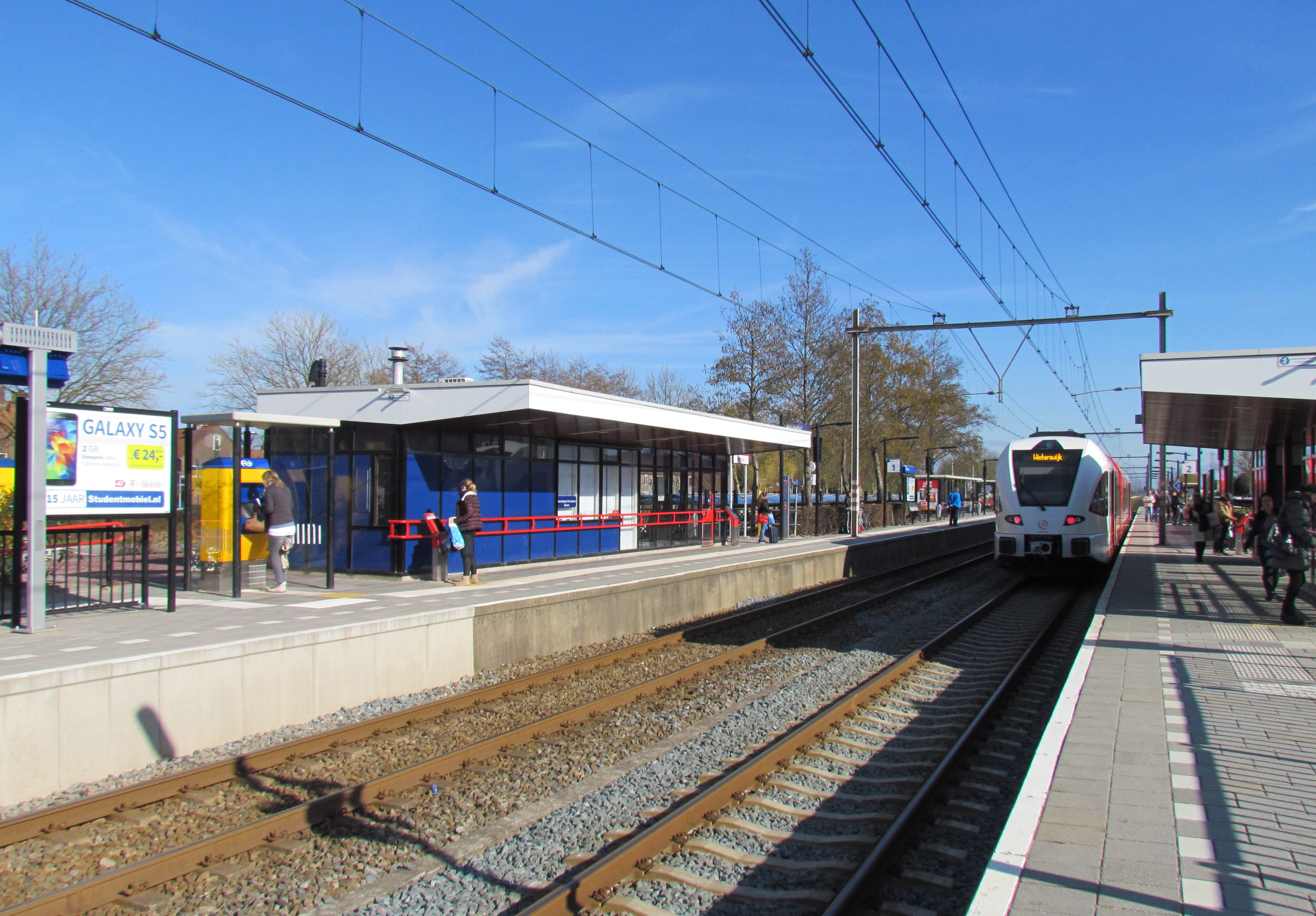 Station Duiven (Arriva) in 2015